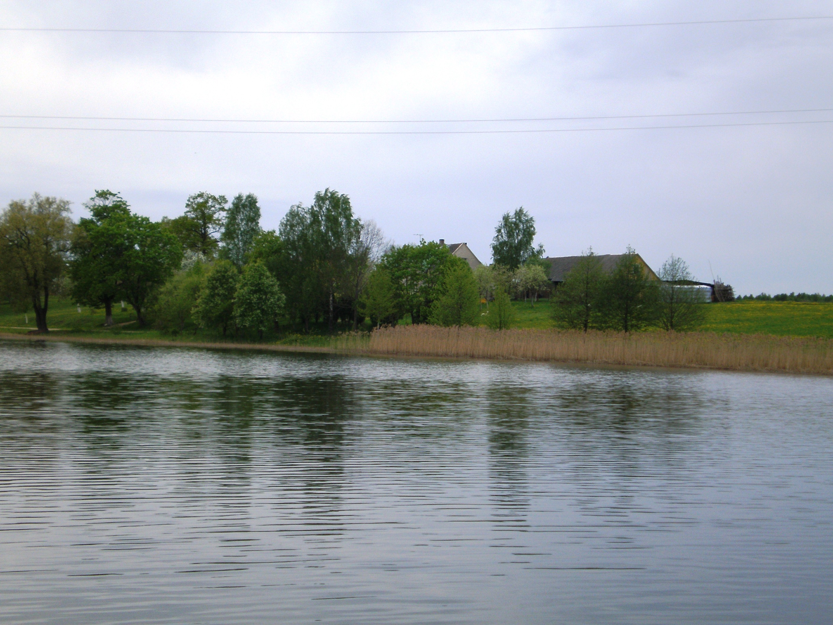 Rukų ežeras, Kėdainių raj.